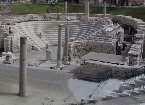 منطقة المسرح الروماني الأثرية بالإسكندرية.